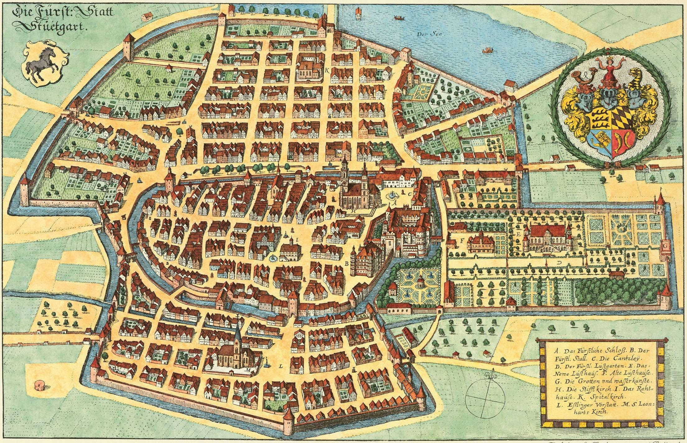 „Die Fürst[liche] Statt Stuetgart“, Vogelschaubild von Stuttgart, Kupfertafel von Matthäus Merian, erste Buchpublikation 1643, 209 x 322 mm. Schefold 7790